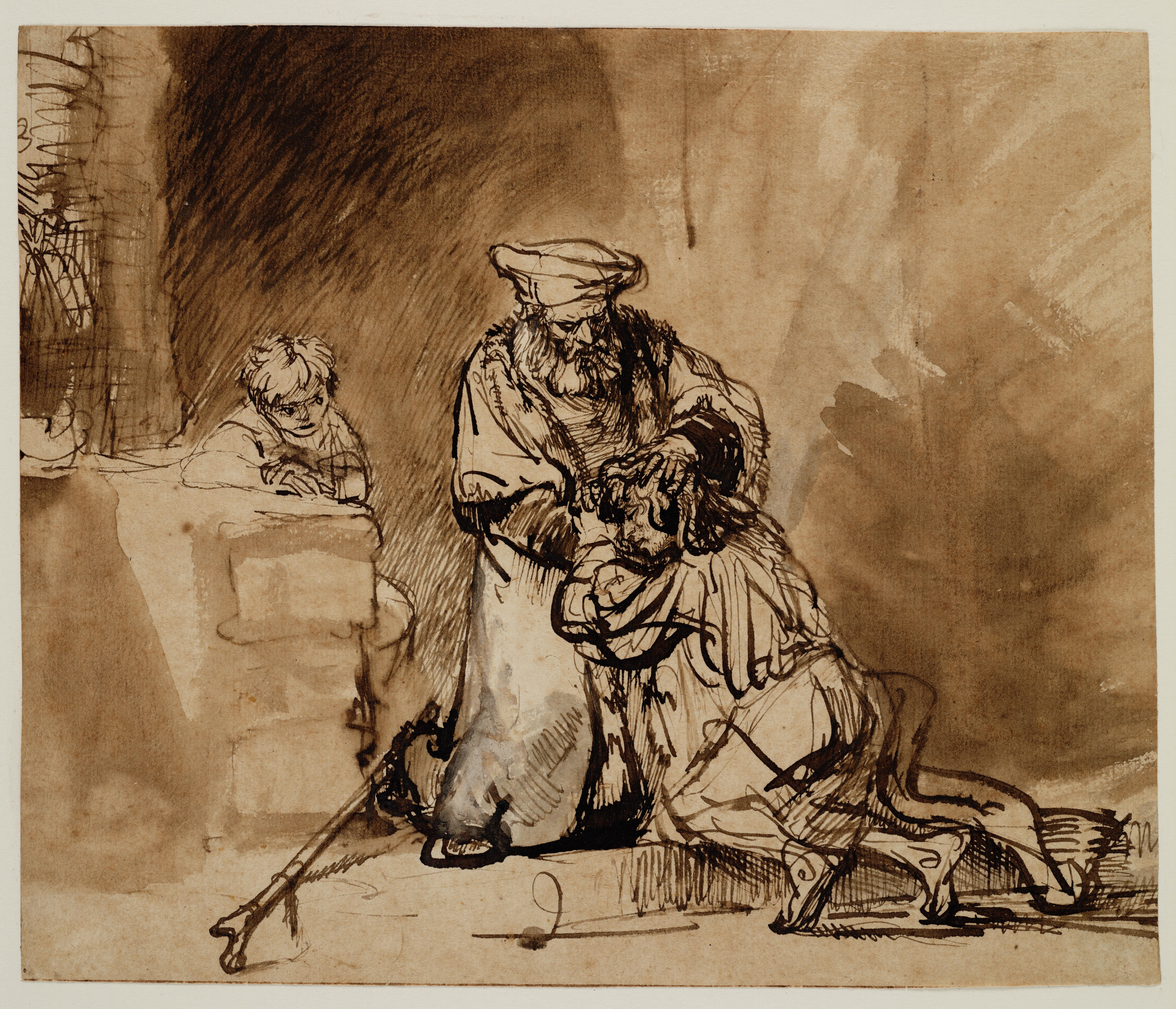 The Return of the Prodigal Son / De terugkeer van de verloren zoon